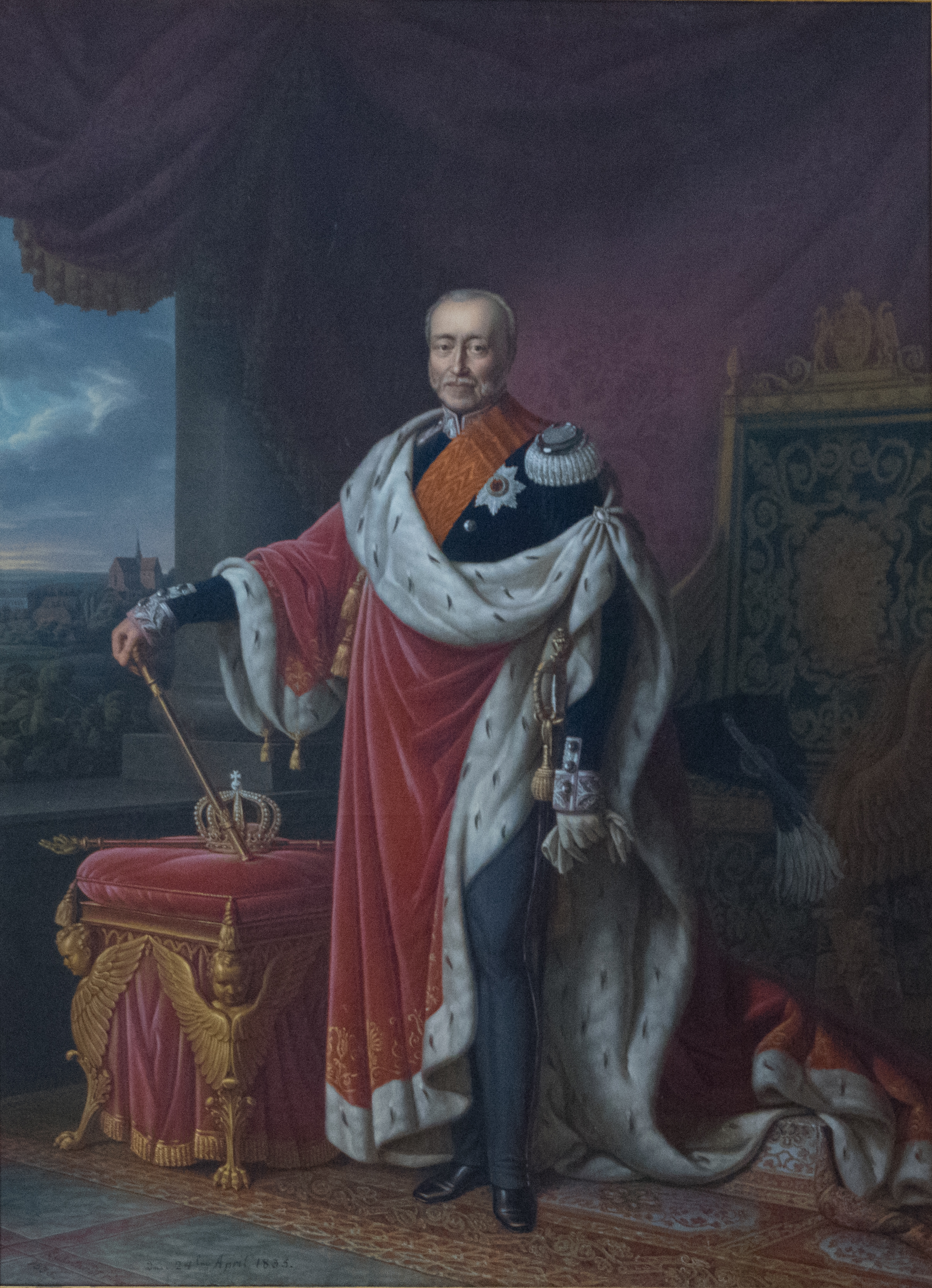 Bad Doberan in Mecklenburg-Vorpommern. Das Gemälde zeigt Friedrich Franz I. auf einem Gemälde im Dom Bad Doberan.